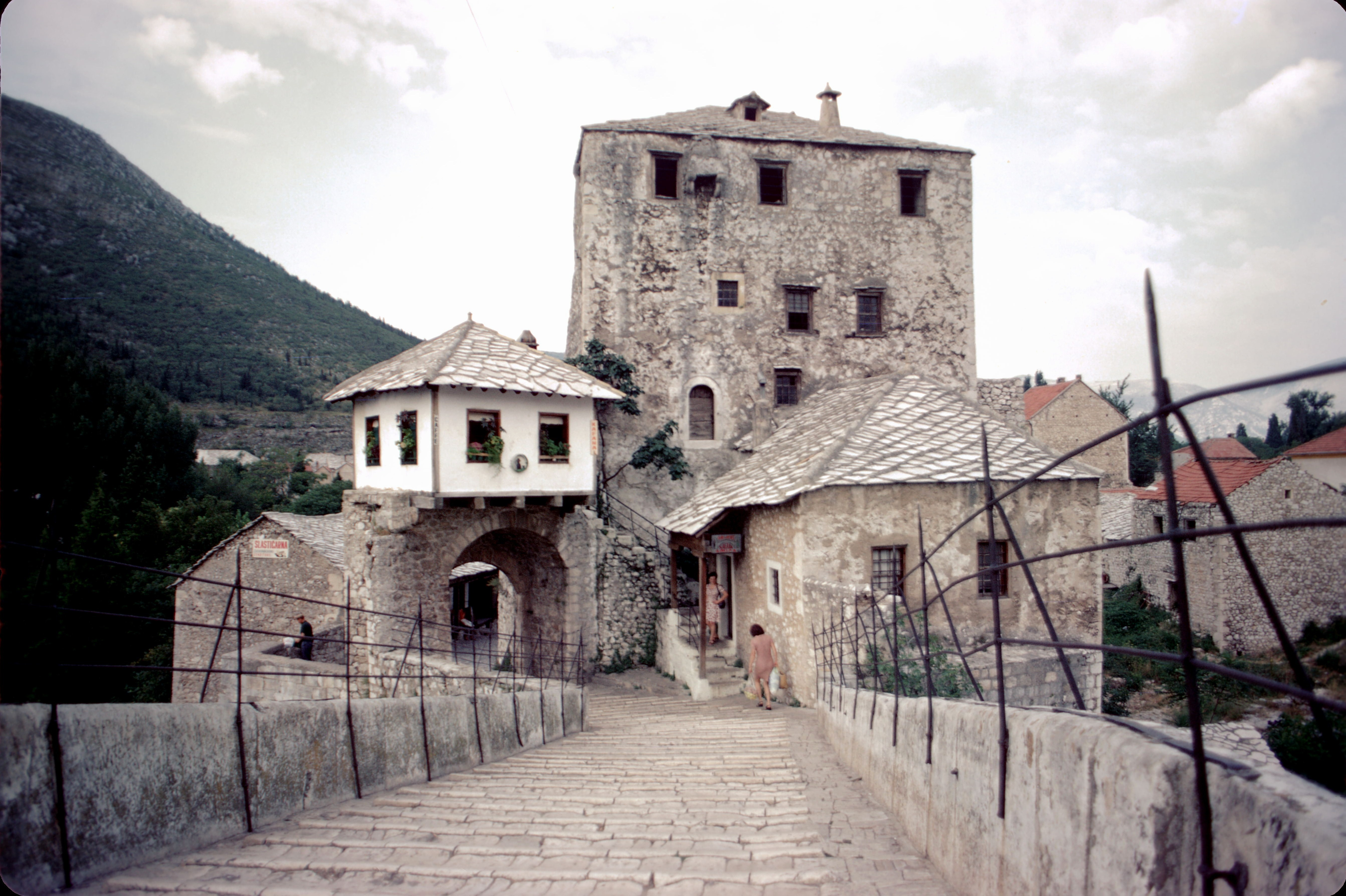 Le Vieux Pont de Mostar (en 1974): la chaussée et la tour Helebija sur la rive droite. Ce pont en dos d' âne construit en 1565 a été détruit par les forces croates du HVO en novembre 1993 et reconstruit en 2003-2004. Il enjambe la rivière Neretva. Mostar, Bosnie-Herzégovine (partie de l' ex-Yougoslavie en 1974).